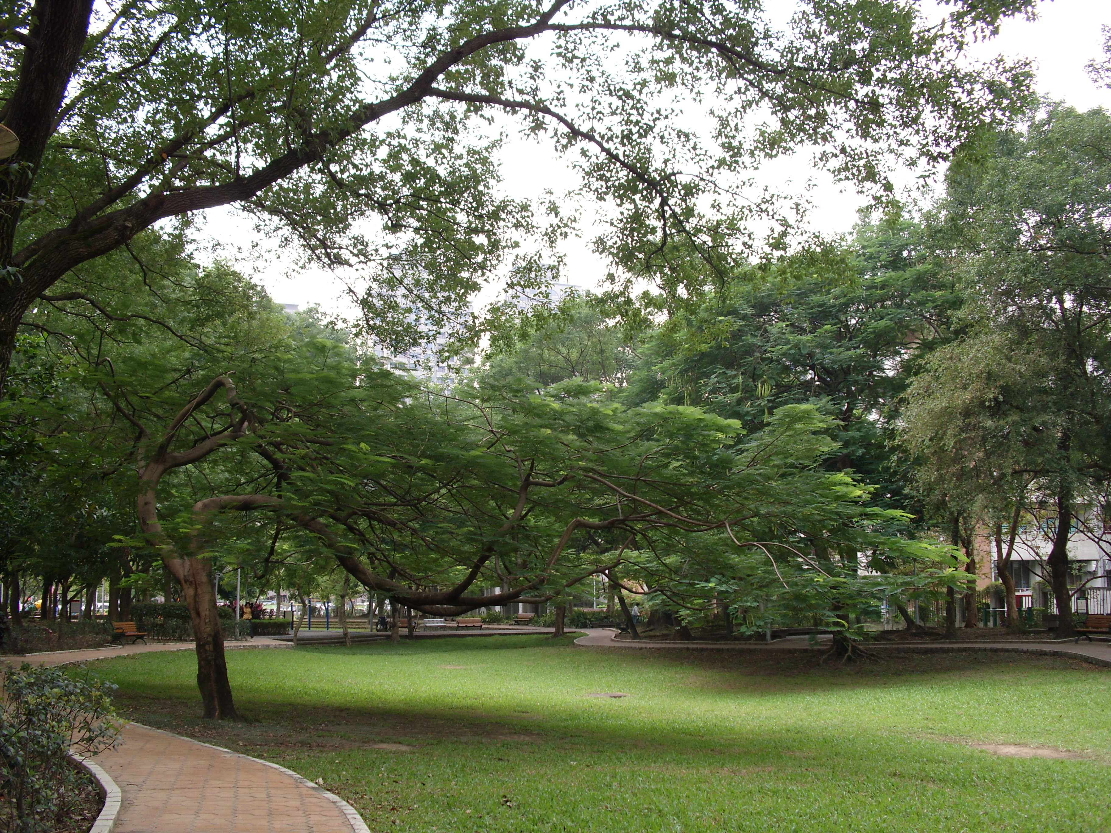 Bân-lâm-gú: 臺北市松德公園